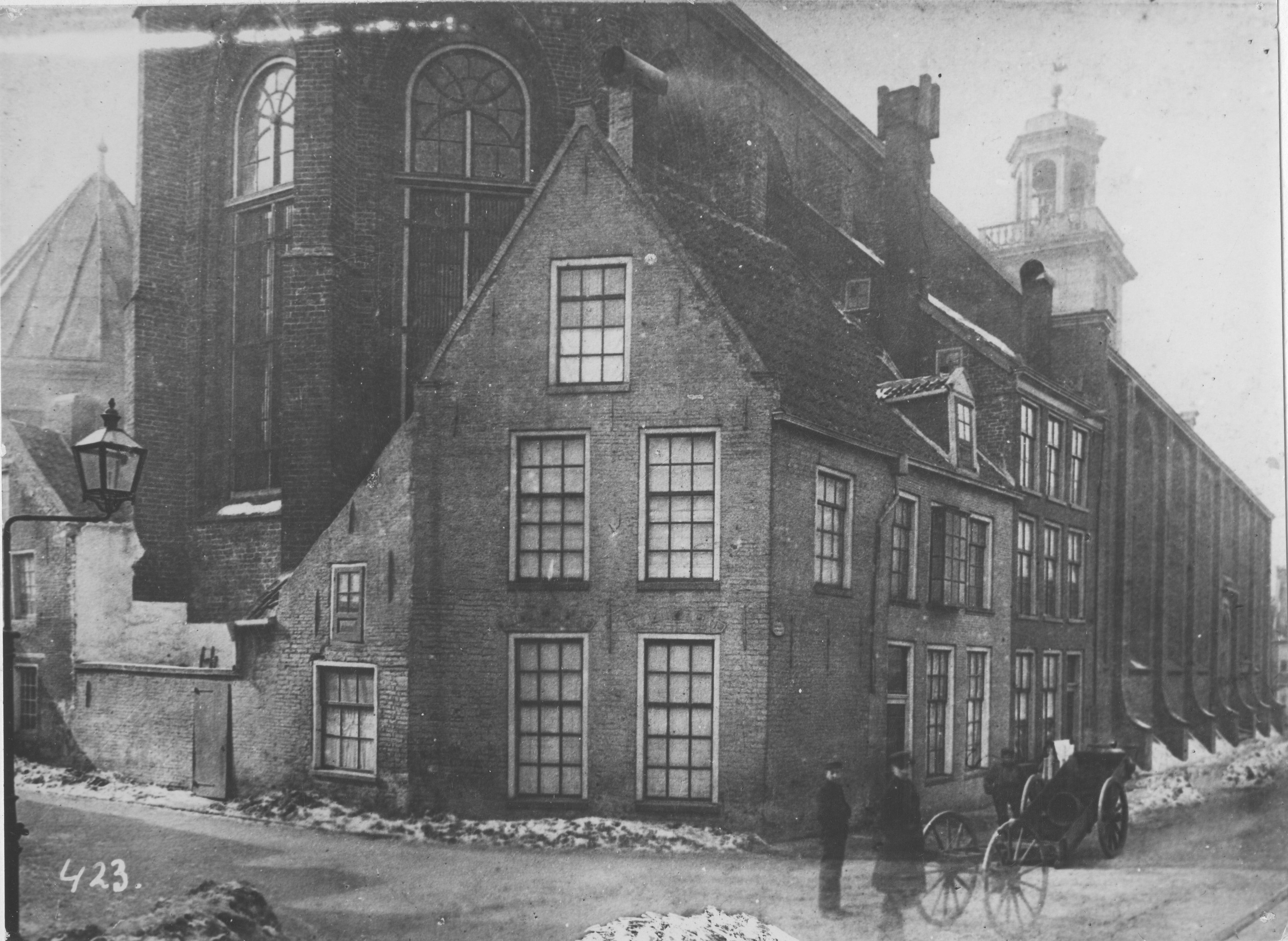 Woning-atelier van fotograaf Johannes Gerhardus Kramer (1845-1903) met op de achtergrond de Broerkerk